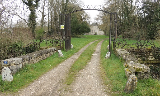 Château de la Brosse: cour d'honneur, hémicycle formé par les douves sèches avec le pont d'accès et la grille mais sans aucune tourelle!